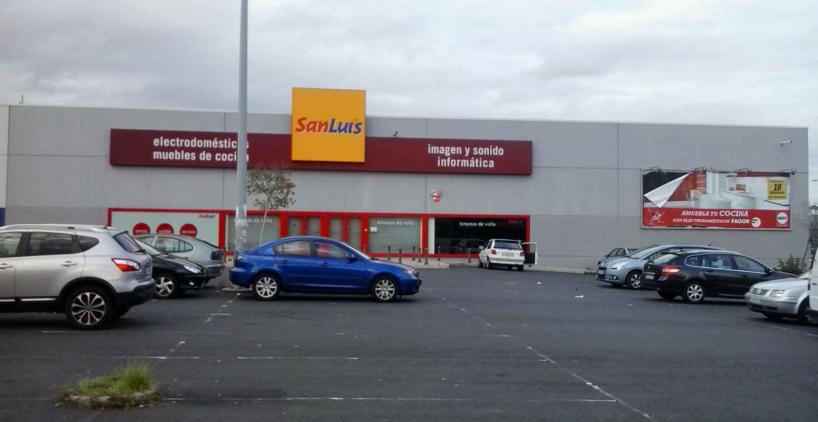 Tenda de San Luis na Gándara, Ferrol A Coruña Galiza